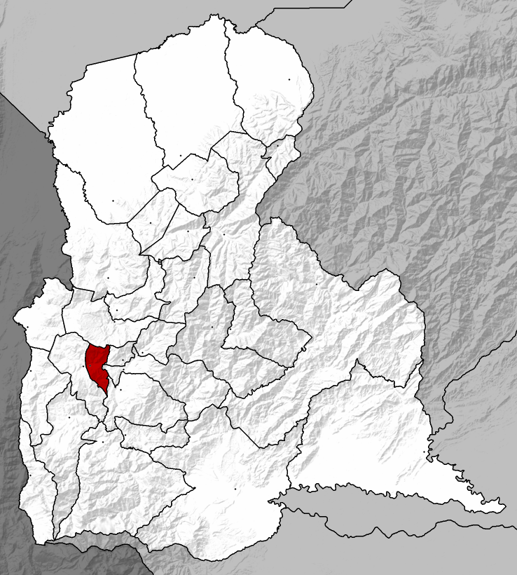 Municipio Independencia - Táchira